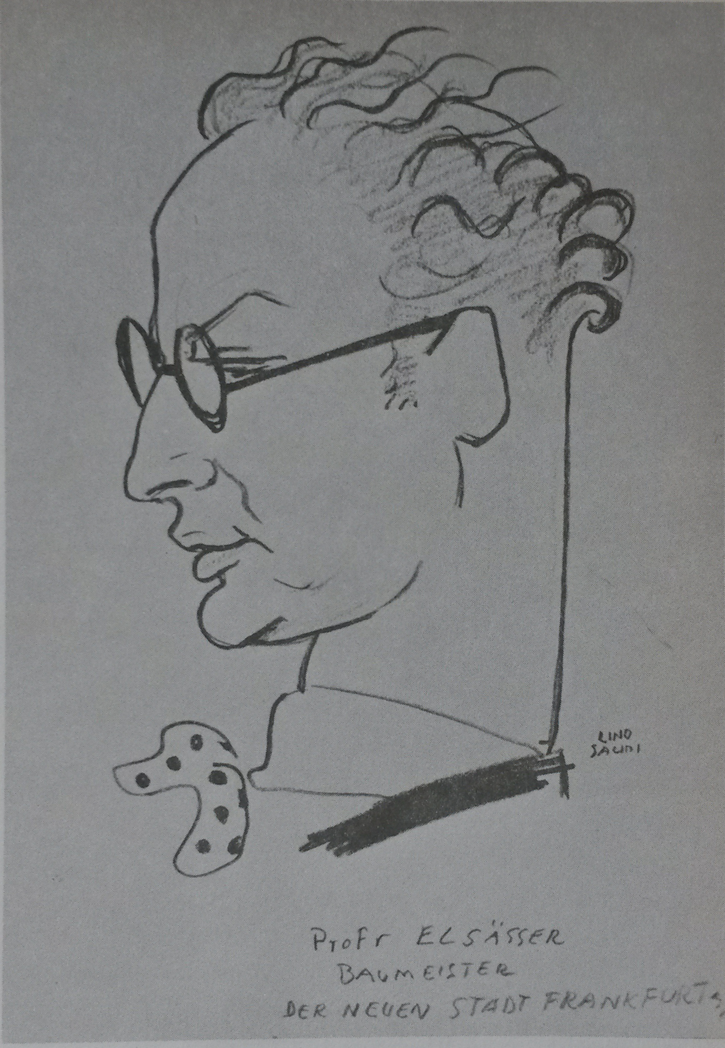 Darstellung von Martin Elsäßer durch Lino Salini